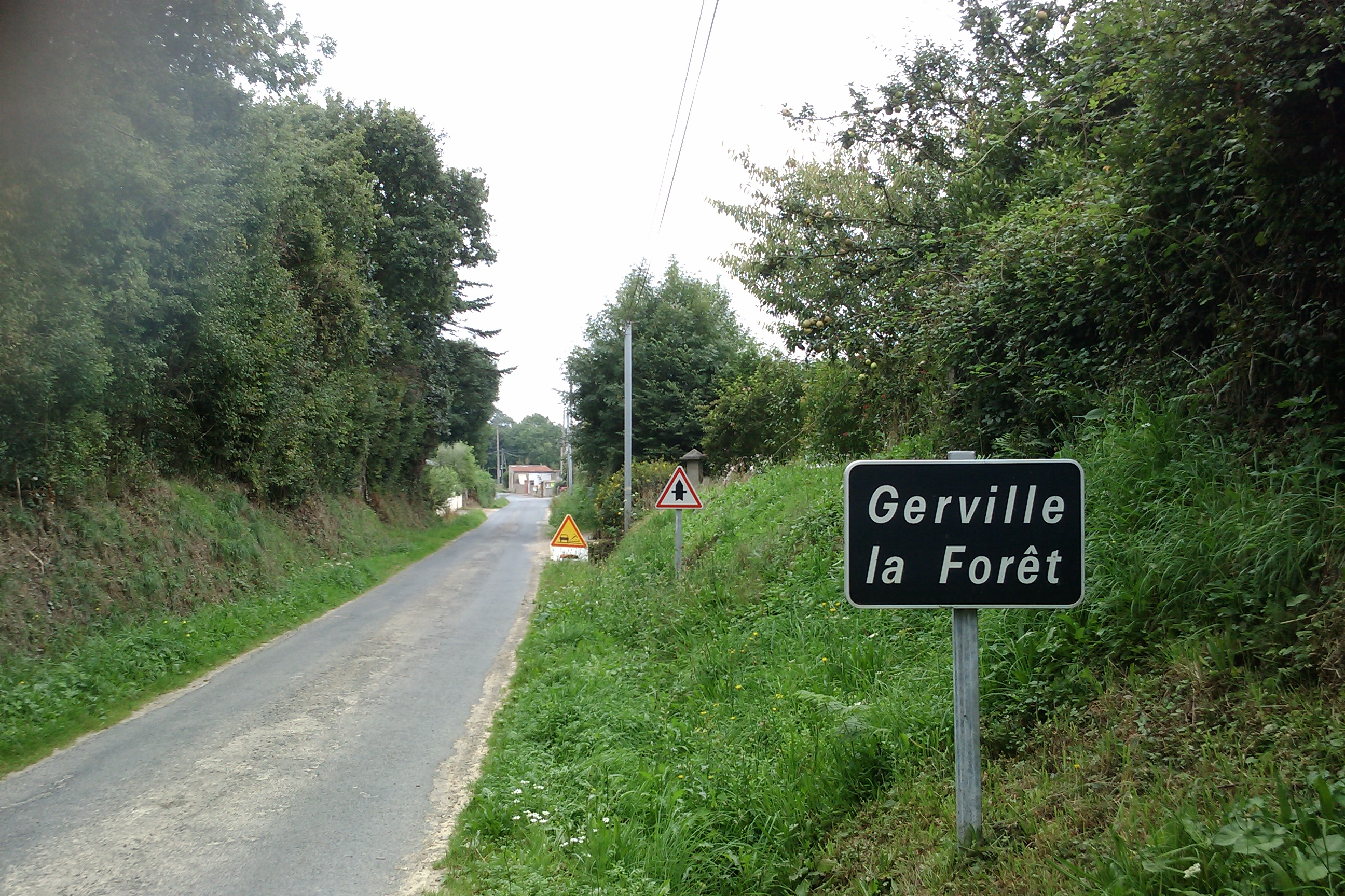 Gerville-la-Forêt, commune associé à Vesly (Manche)